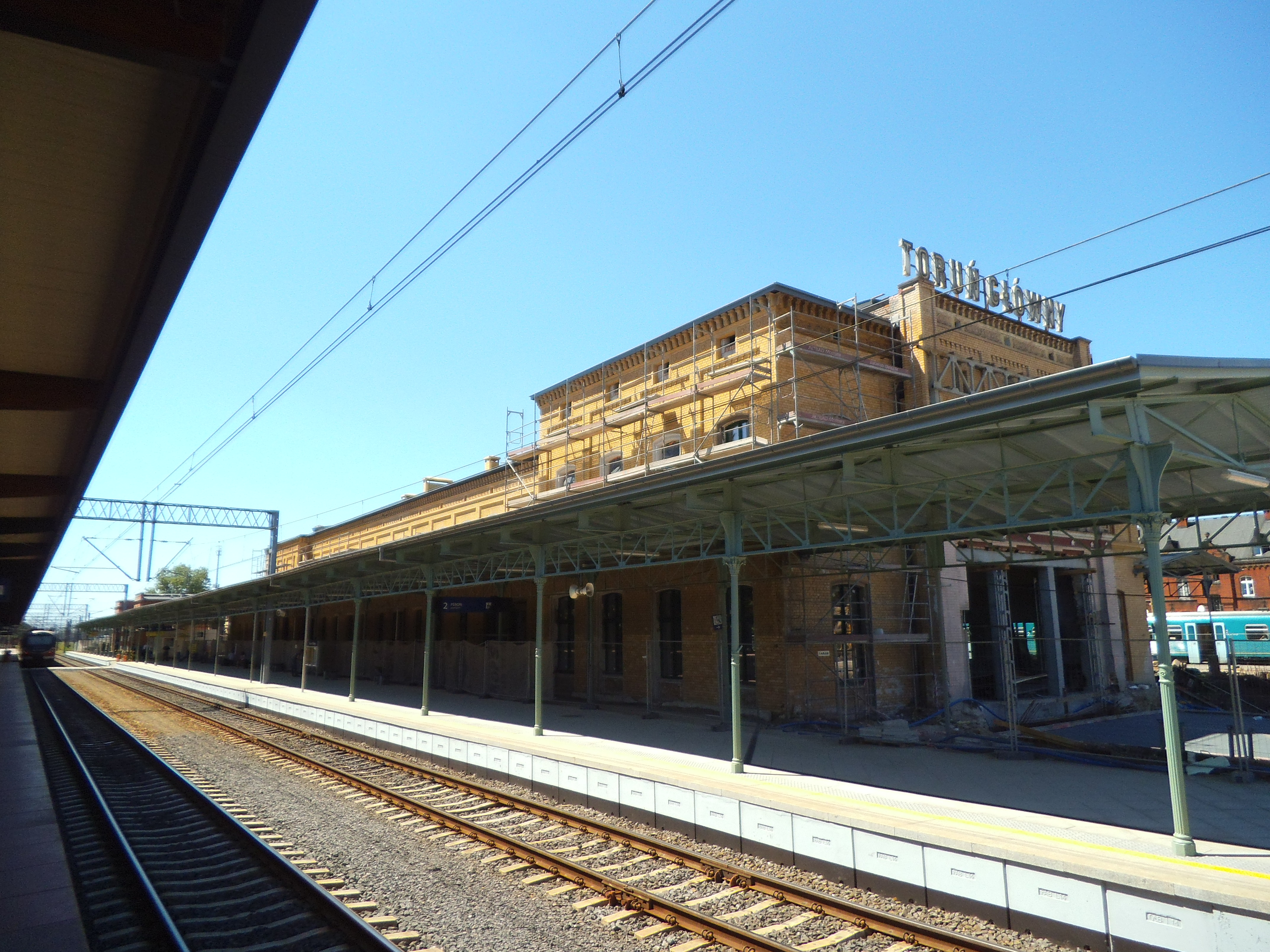 Toruń Główny-czerwiec2015